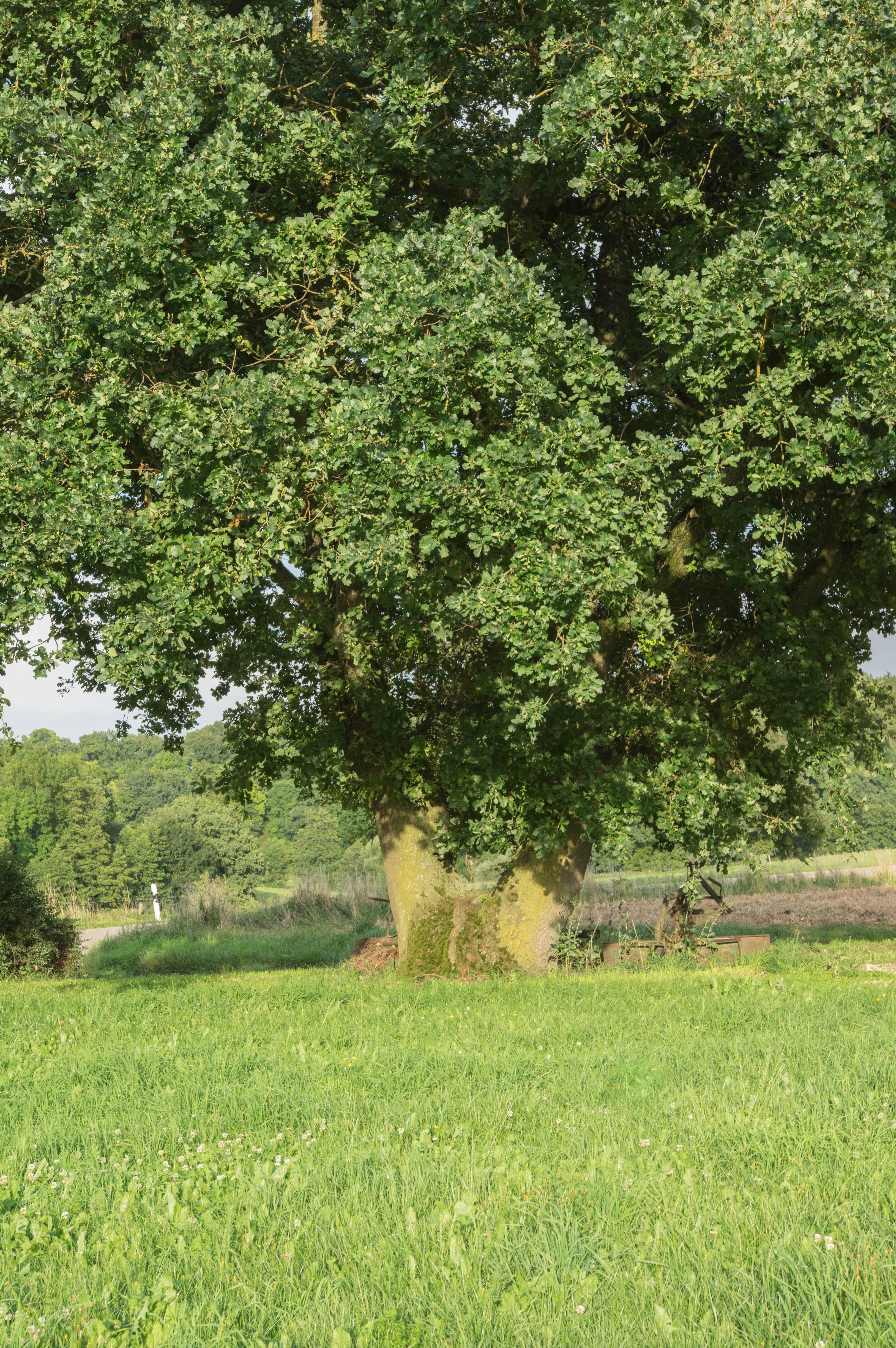 zweigriffige alte Eiche in Gansheim, Detail Stamm, Naturdenkmal ND-07092